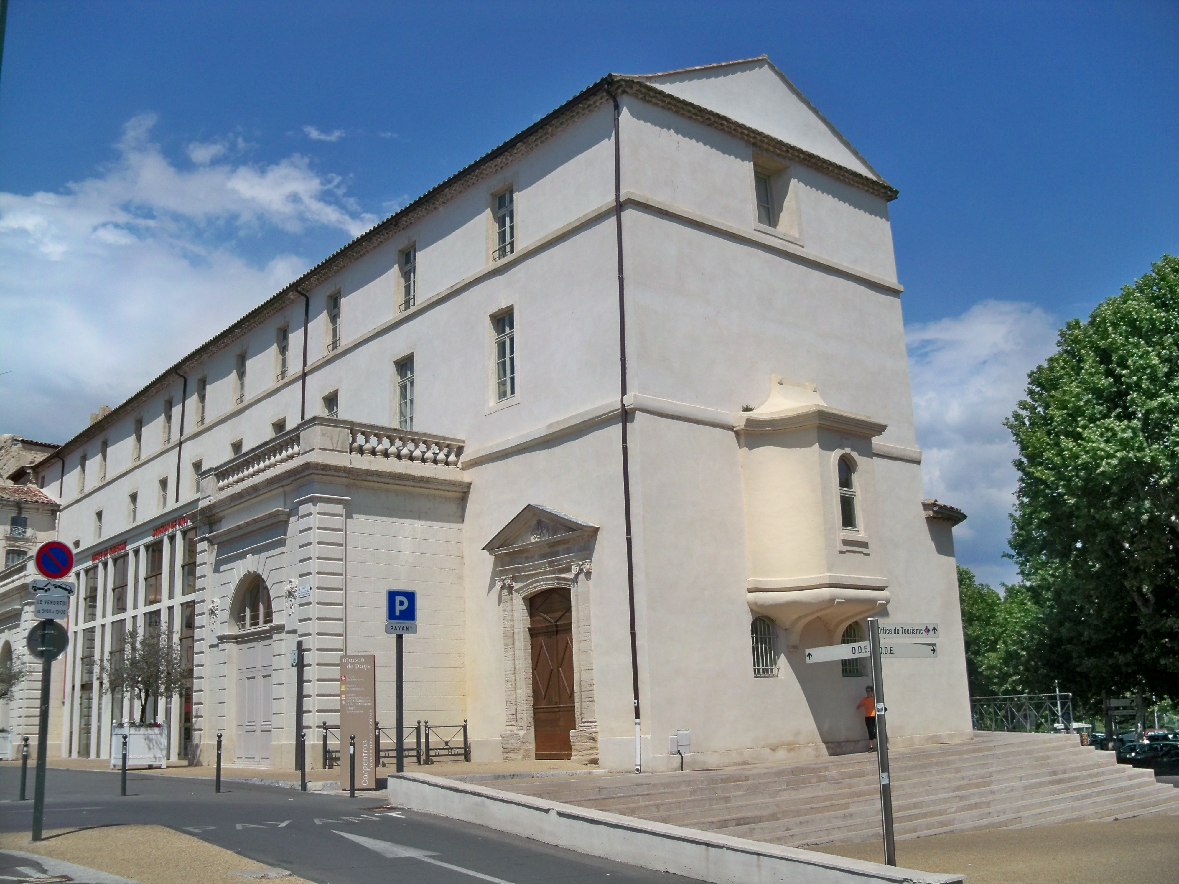 Office du tourisme de Carpentras (Vaucluse, France), ancien couvent des Dominicains